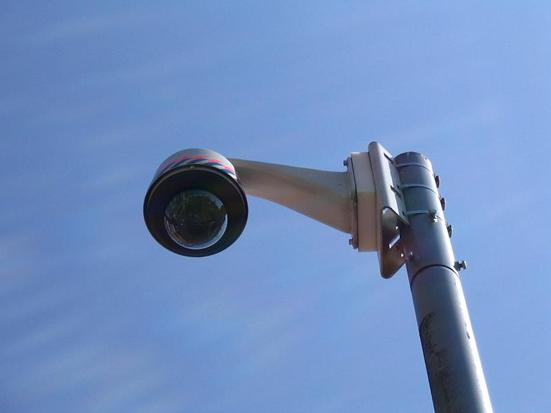 Foto van gemeentelijke camera in centrum van Amsterdam.